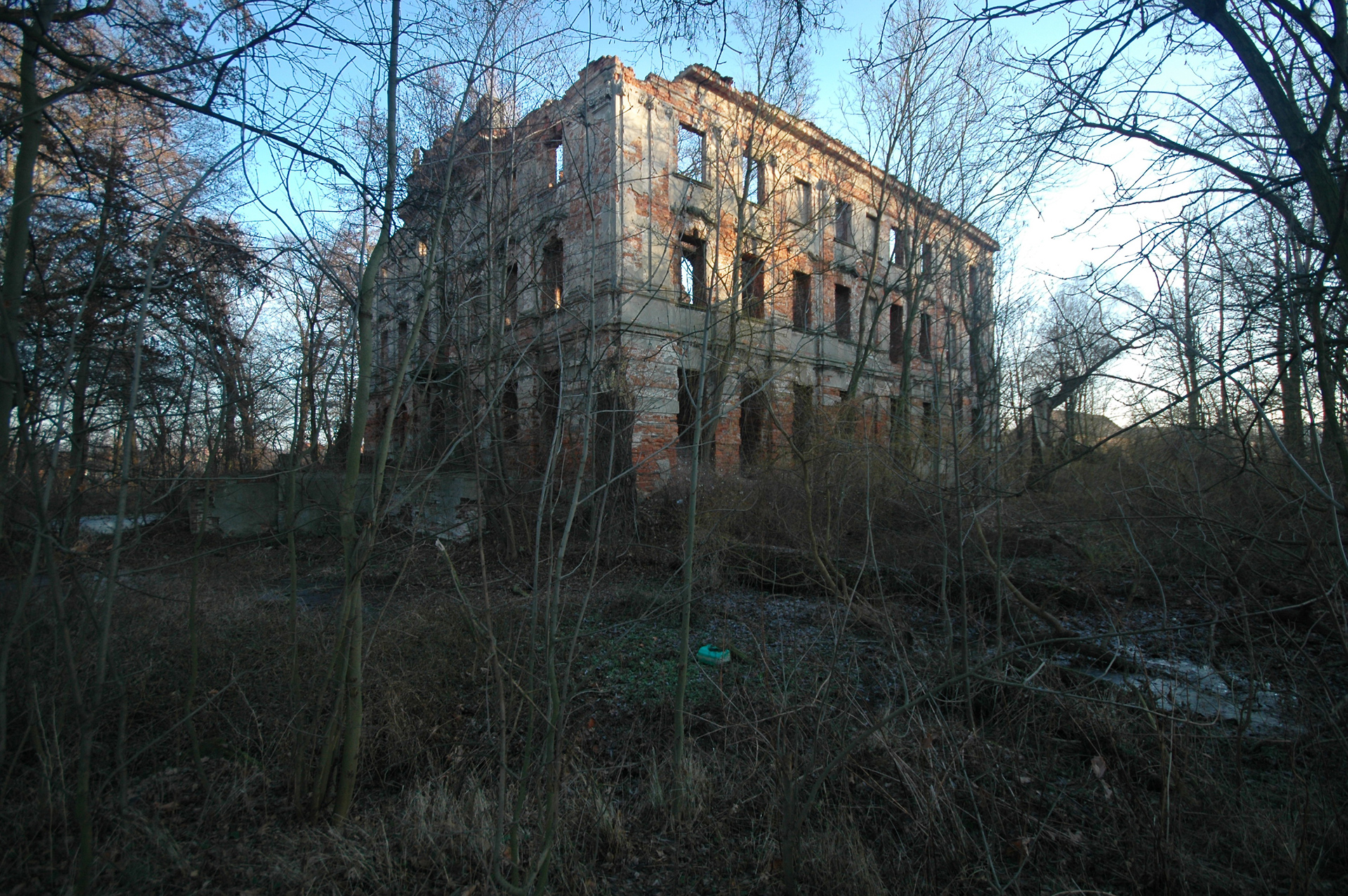 Krzydłowice - pałac (ruina) z parkiem (zabytek nr rejestr. A/2967/173/323/L z dn. 15.03.61)